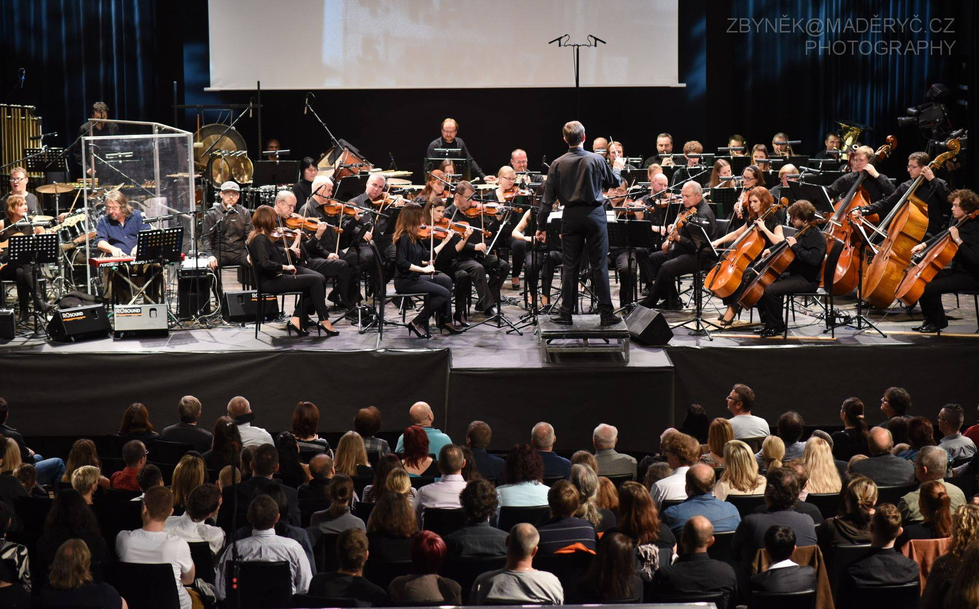 The Plastic People of the Universe a Filharmonie Brno - Co znamená vésti koně. Koncert v SONO Centru, Brno - 17.11.2015.